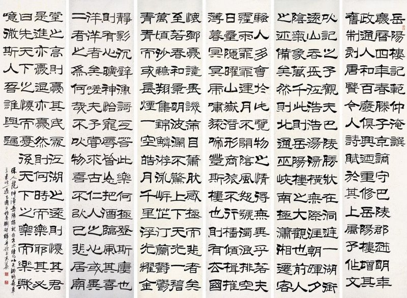 中文（中国大陆）: 范仲淹岳阳楼记